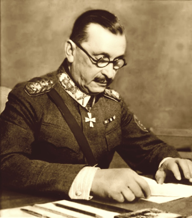 Marsalkka Mennerheim